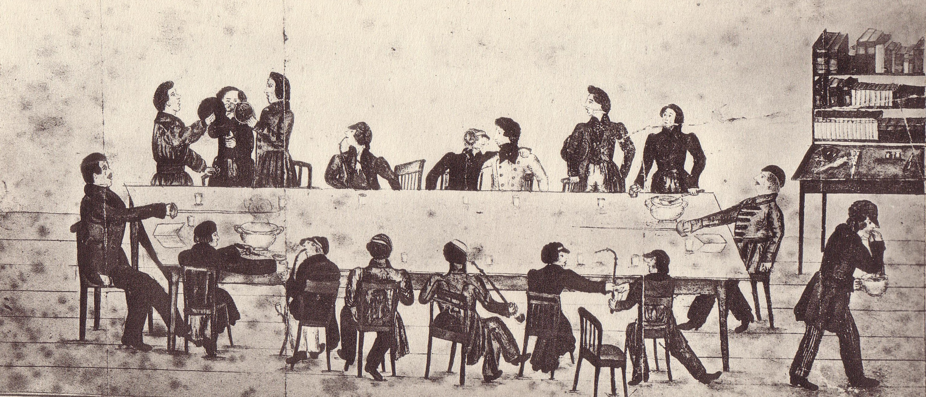 Kneiptafel der Königsberger Corpslandsmannschaft Baltia